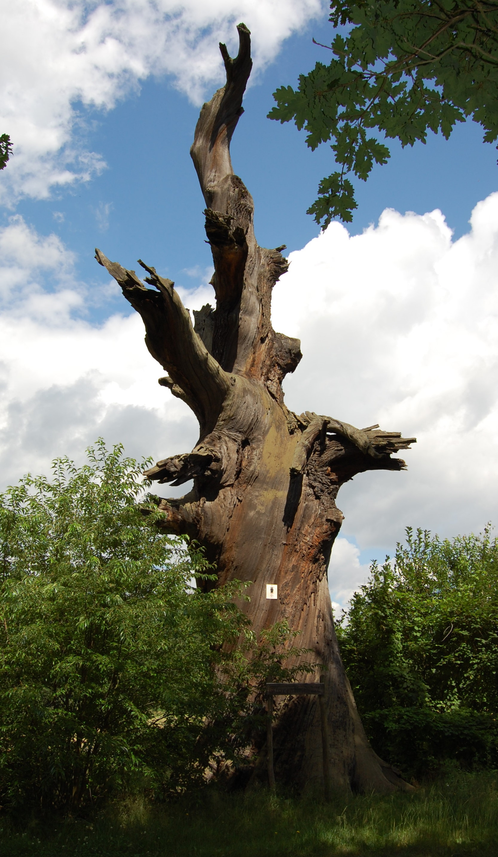 Florentine-Eiche bei Straupitz, Brandenburg, Deutschland.